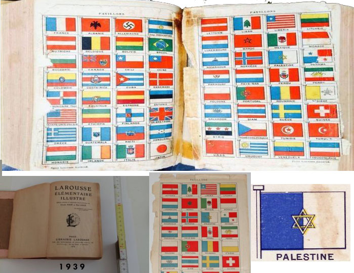 Согласно французскому словарю Ларус (Larousse) 1939 года [1] Флаг Палестины представлял из себя разделённое вертикально пополам бело-голубое поле с голубой частью у древка и изображённой в центре шестиконечной звездой Давида.